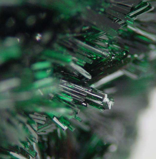 Atacamit Fundort: Mina La Farola, Copiapo, III. Region, Chile Atacamit-Kristalle in kreuz und quer stehenden Büscheln. Gesamtgröße der Stufe ca. 40 x 30 mm